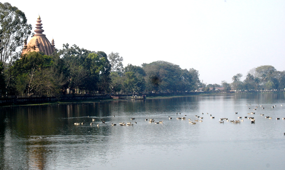 অসমীয়া: শিৱসাগৰৰ পুখুৰী